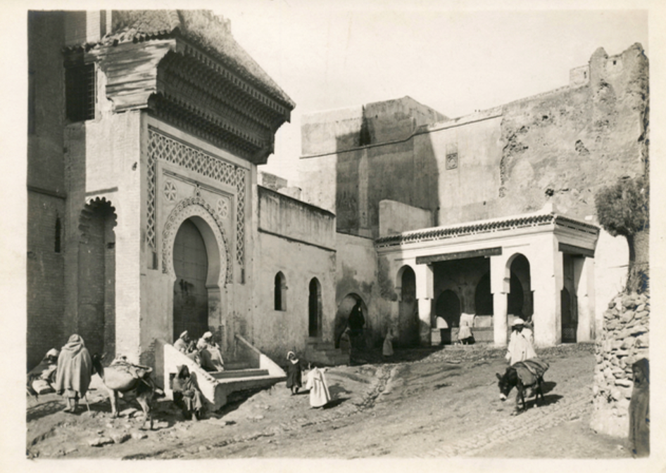 bab guissa 1920, vieille ville de Fès